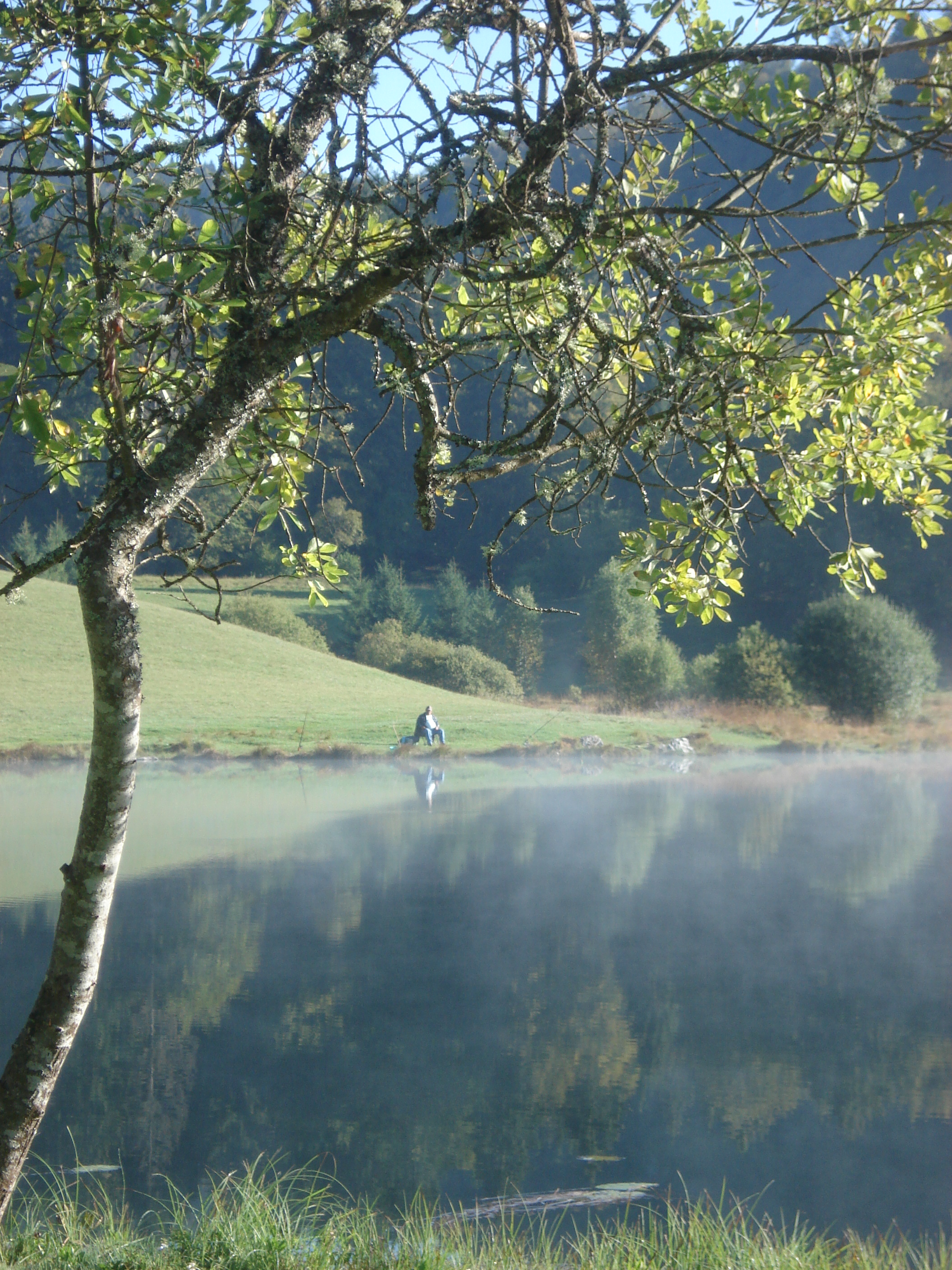 Angler am Lac Genin